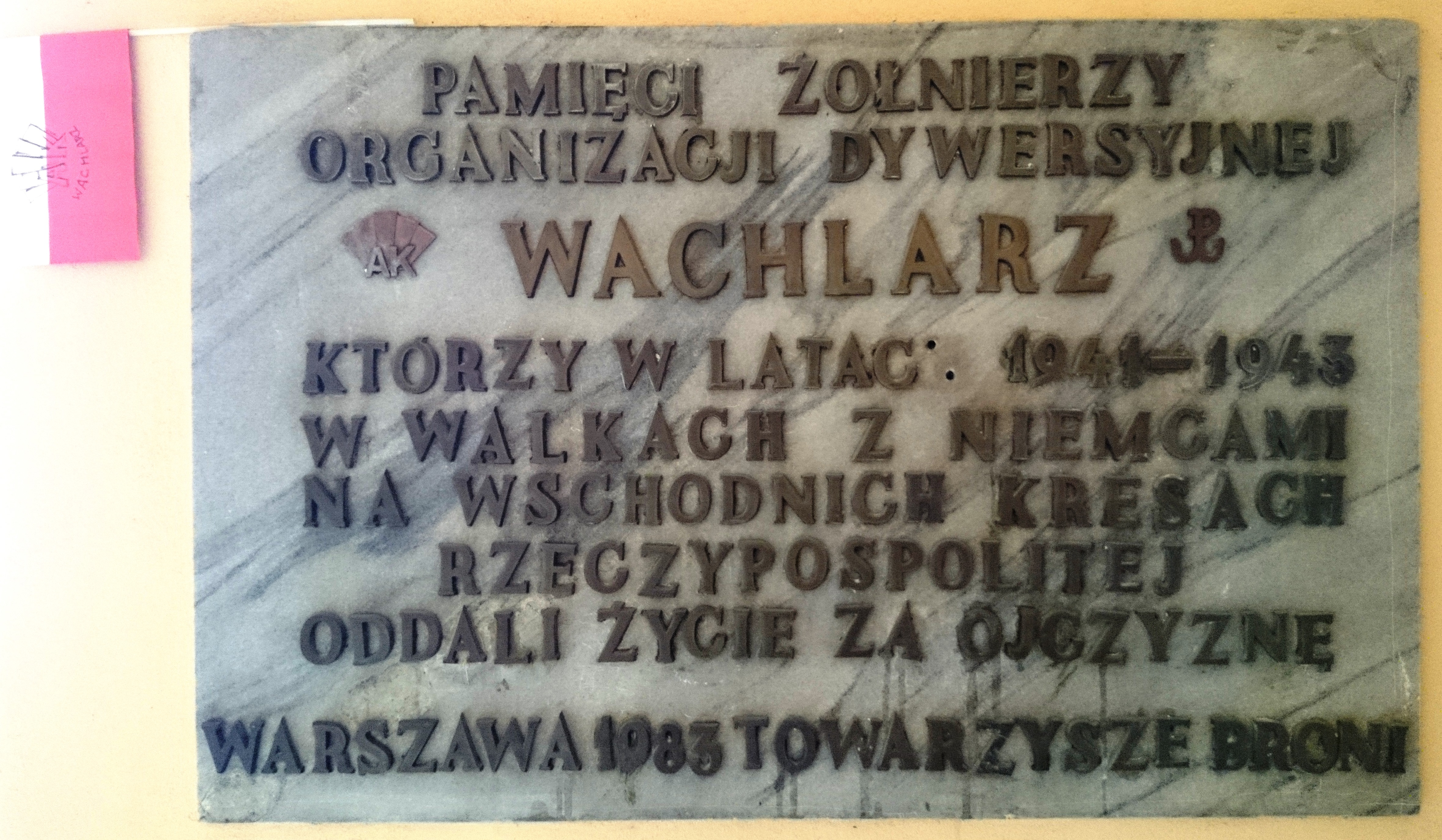 Tablica poświęcona żołnierzom Wachlarza na dziedzińcu kościoła św. Marcina w Warszawie